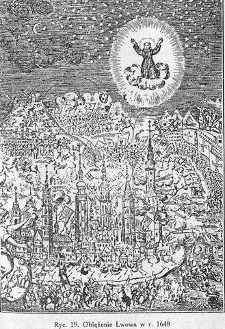 Rycina przedstawiająca cudowne ocalenie Lwowa przez Jana z Dukli w 1648. Grafika nieznanego autora pochodzi z książki Historia Lwowa w zarysie wyd. w 1924. Stako 10:37, 27 wrz 2005 (CEST)